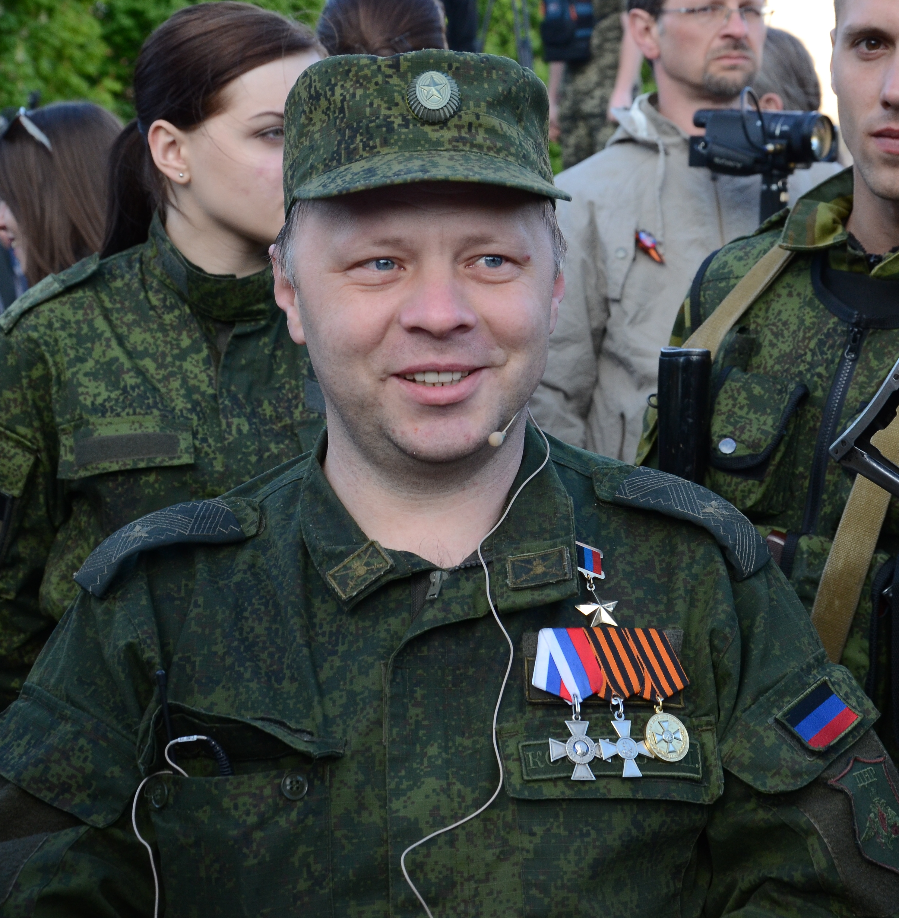 Репетиция парада в честь дня Победы в Донецке